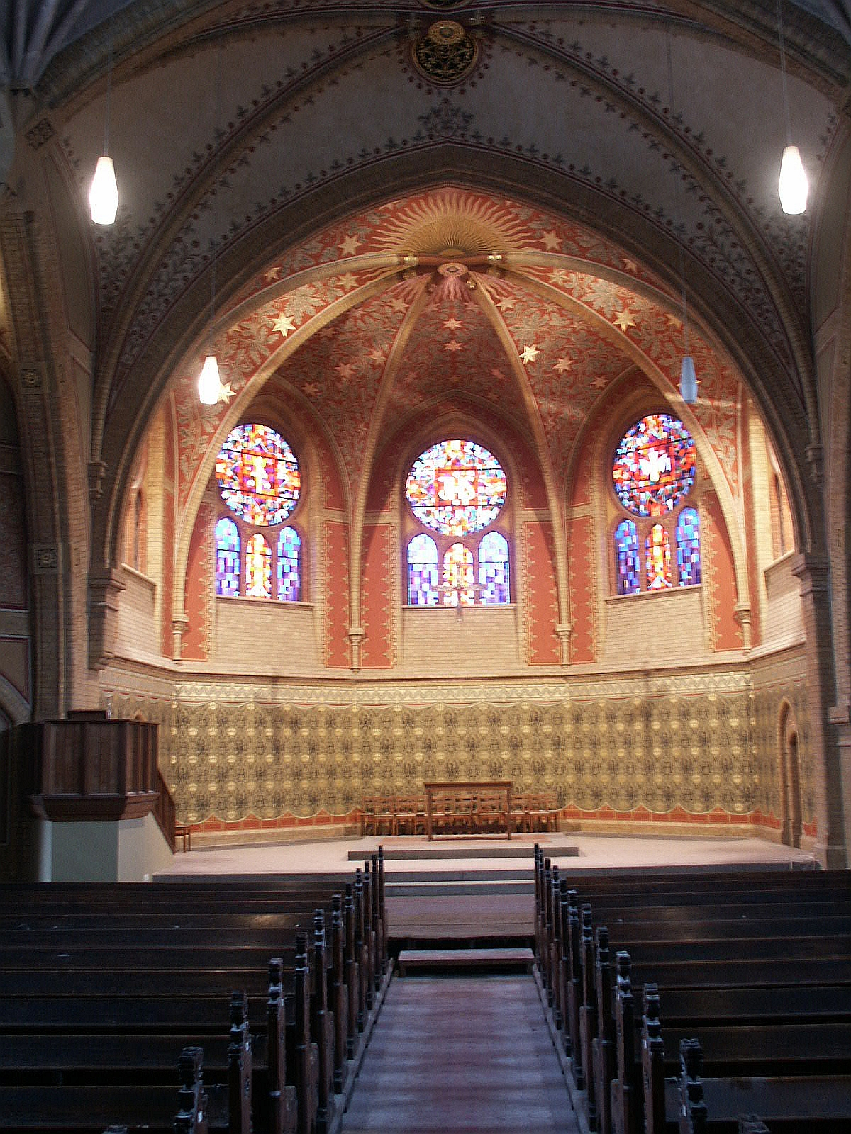 Restaurierter Chorbereich Erlöserkirche Potsdam